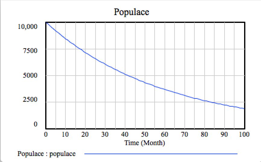 Graf simulace zivotniho cyklus SFD, Vensim, varianta smrti